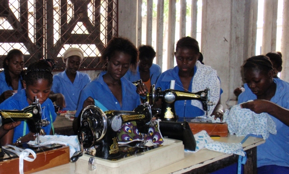 Jeunes filles apprenant la couture - École Spéciale de Brazzaville